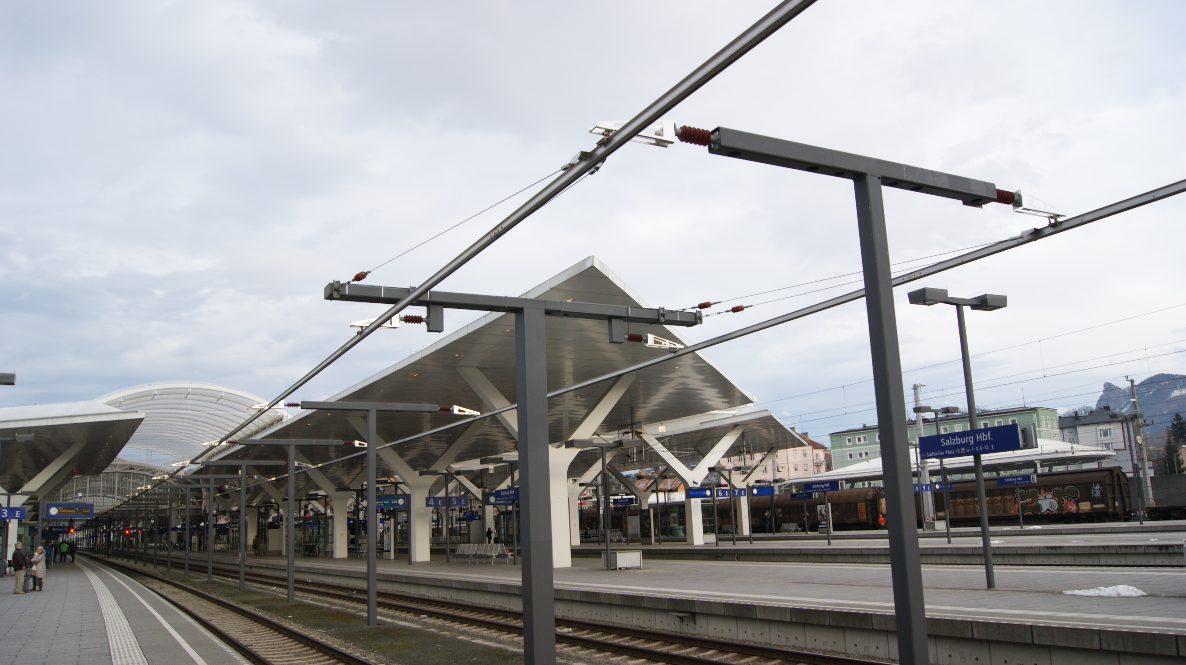 Oberleitungsschiene im Hauptbahnhof in Salzburg über Gleis 3 und 4. Inbetriebnahme am 10. November 2011 bzw. Gleis 4 im März 2012. Das System wurde 1984 von Furrer+Frey entwickelt. Bereits 1890 waren in Baltimore (USA) Bahnanlagen mit Stromschienen ausgerüstet. In Japan wurden Versionen seit 1968 betrieben. Diese Stromschiene von Furrer+Frey wurde in bestehende Fahrleitungsabschnitte integriert.